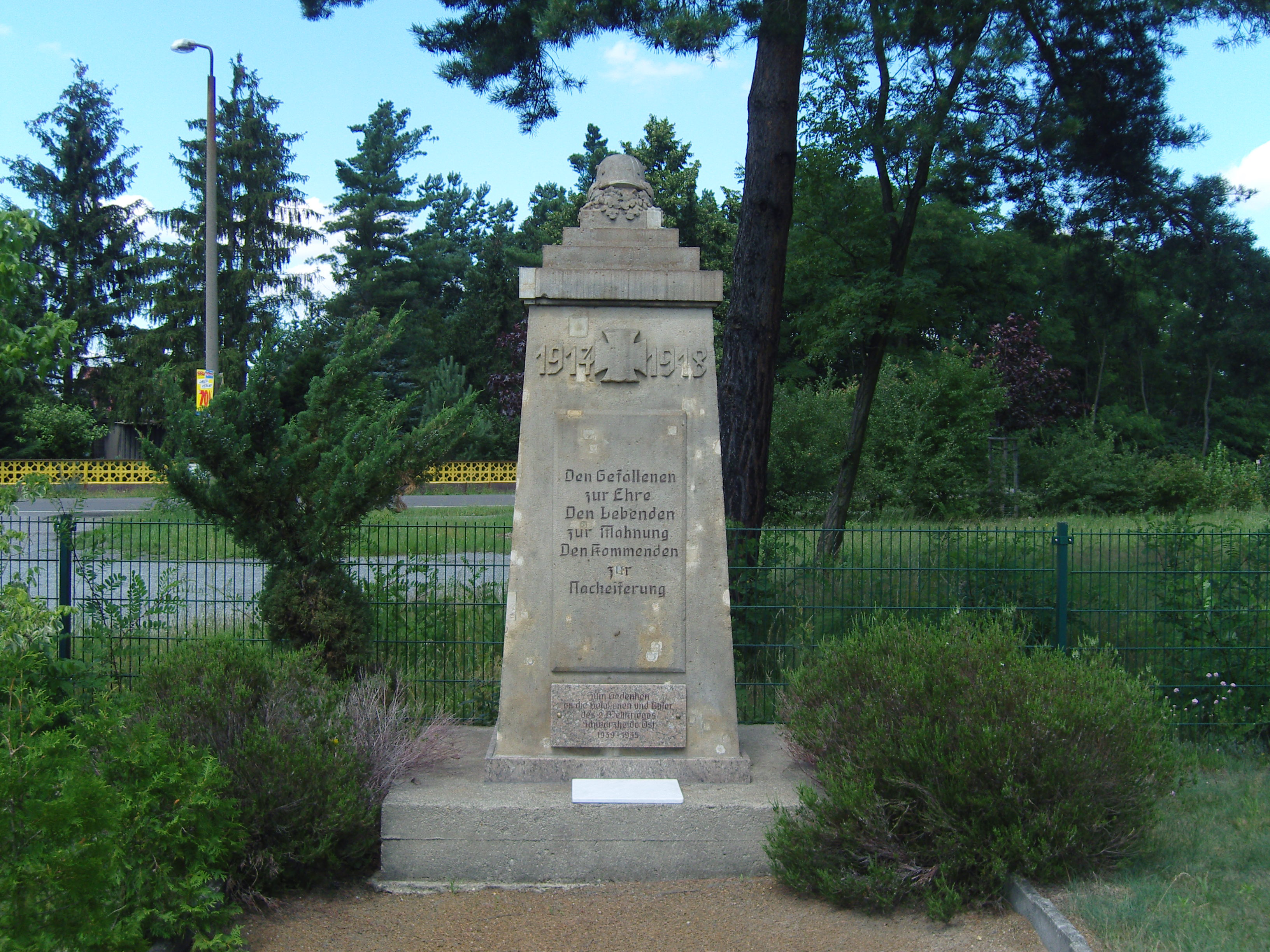 Kriegerdenkmal für die Gefallenen des Ersten Weltkrieges auf dem Friedhof in Schwarzheide, ehemals Naundorf